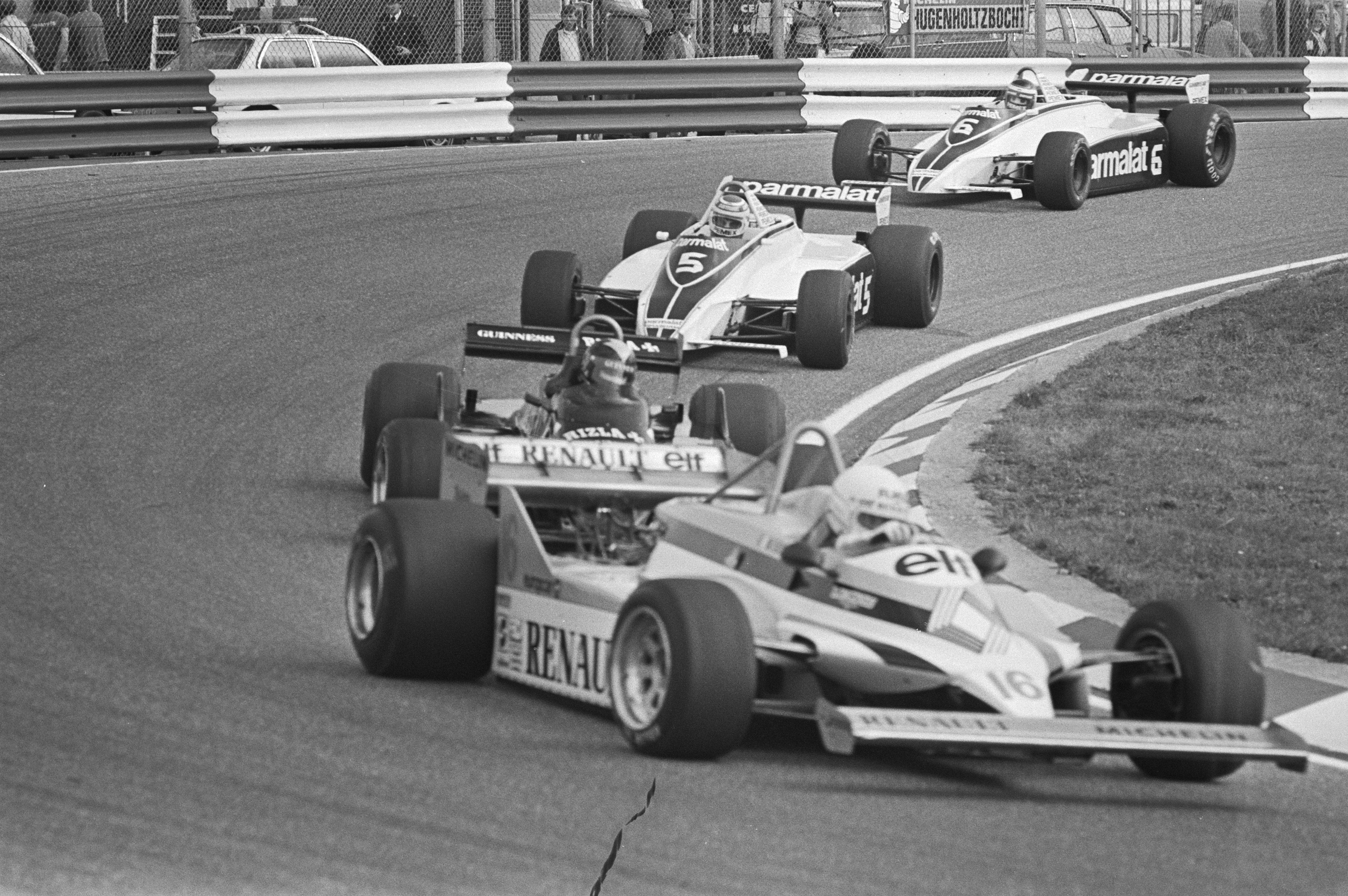 Collectie / Archief : Fotocollectie Anefo Reportage / Serie : Training op het Circuit van Zandvoort i.v.m. de Grand Prix van aanstaande zondag Beschrijving : Training van de Grand Prix Formule 1 van 1981op het circuit van Zandvoort. Op kop Renë Arnoux in een Renault (nr. 16), tweede Nelson Piquet in een Brabham-Ford (nr.5) en als derde teamgenoot Hector Rebaque in Brabham-Ford (nr. 6) Datum : 28 augustus 1981 Locatie : Noord-Holland, Zandvoort Trefwoorden : autorace's, circuits, raceauto's Persoonsnaam : Arnoux, René, Piquet, Nelson, Rebaque, Hector Fotograaf : Dijk, Hans van / Anefo, [onbekend] Auteursrechthebbende : Nationaal Archief Materiaalsoort : Negatief (zwart/wit) Nummer archiefinventaris : bekijk toegang 2.24.01.05 Bestanddeelnummer : 931-6475